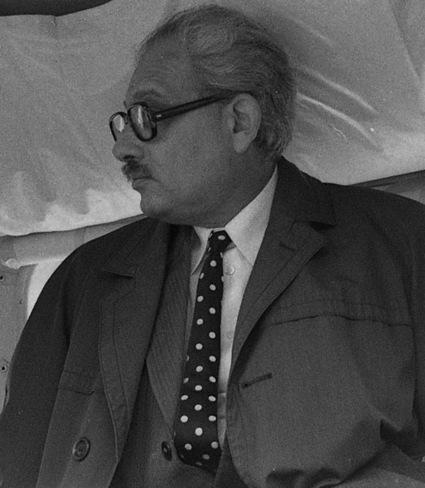 Schultheisz Emil magyar orvos, belgyógyász, orvostörténész, egyetemi tanár, egészségügyi miniszter.